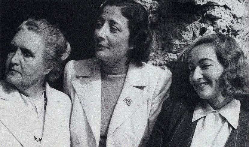 da sinistra:Sibilla Aleramo, Maria Luisa Astaldi e Alba de Céspedes